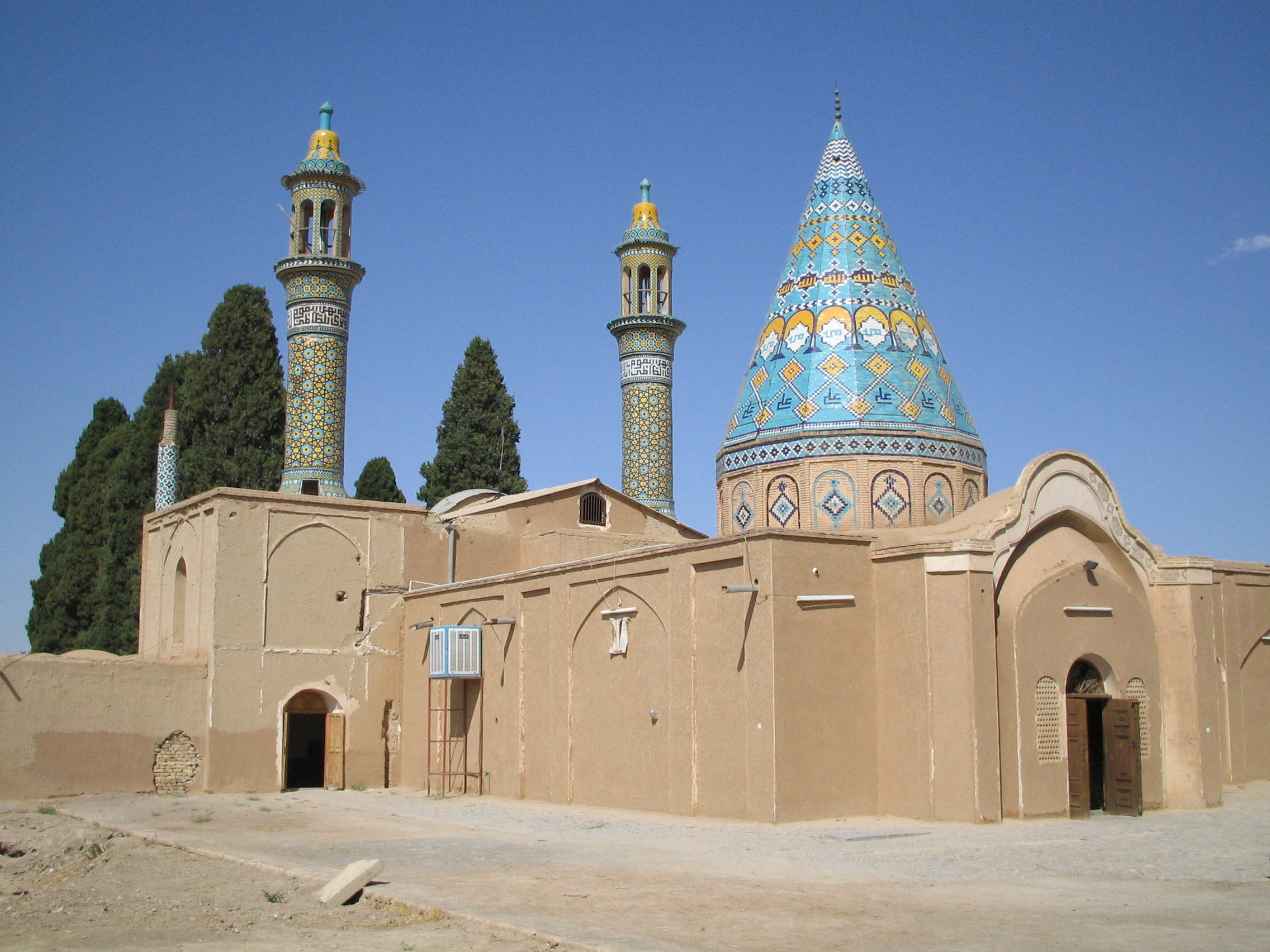 Emamzadeh Abu Lolu in Kashan, Iran.